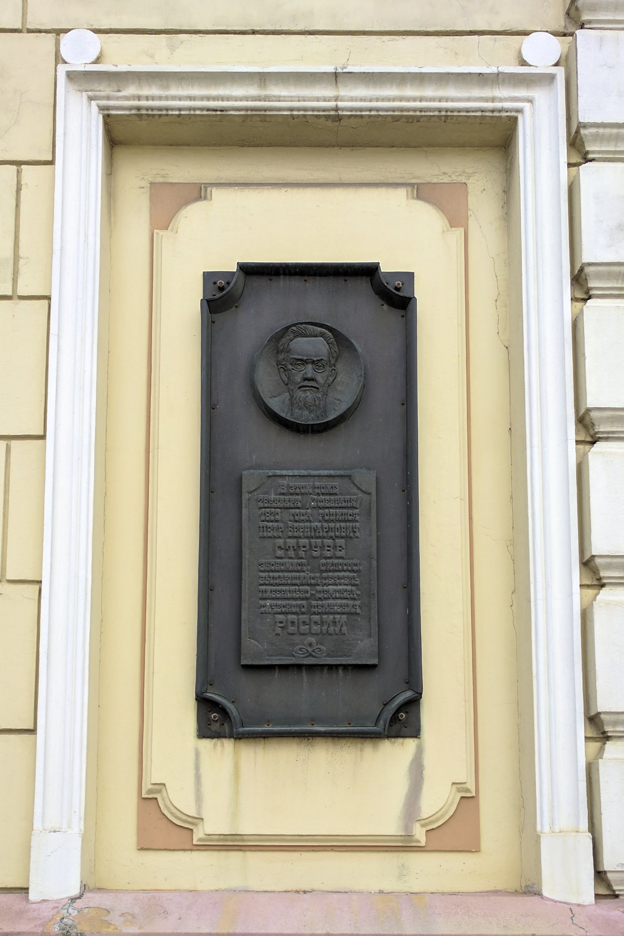 Дом Губернатора. Петр Струве, табличка. "В этом доме 26 января /7 февраля/ 1820 года родился Петр Бернгардович Струве, экономист, философ, выдающийся деятель либерально-демократического движения России."